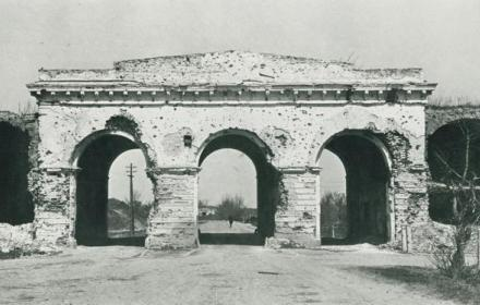 Брэсцкая брама Брэсцкай крэпасці